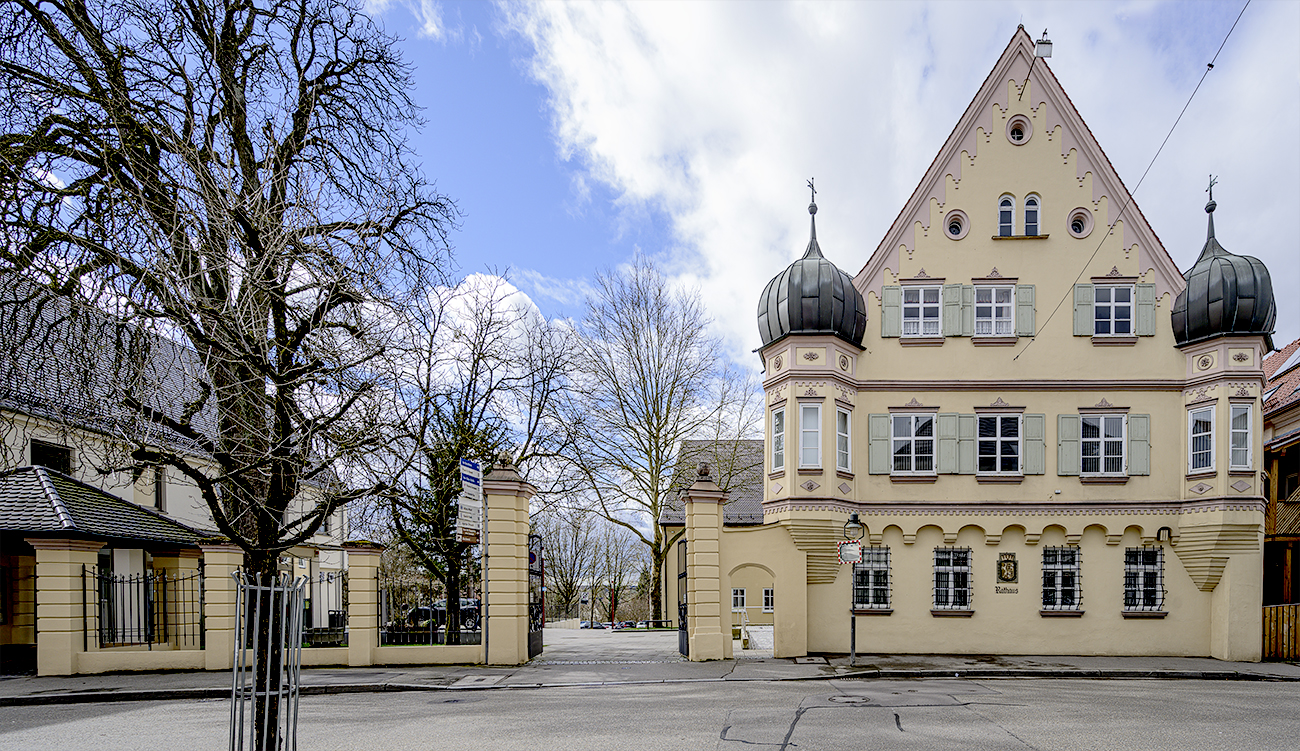 Ichenhausen, Bavaria, City Hall